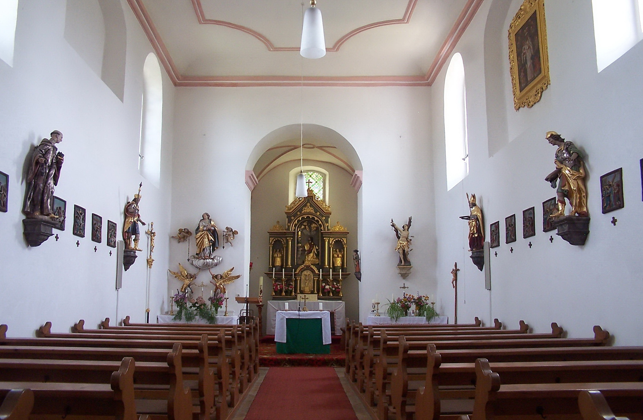 Wörth an der Donau. Kiefenholz. Kath. Filialkirche Jakobus d.Ä. Innenraum.